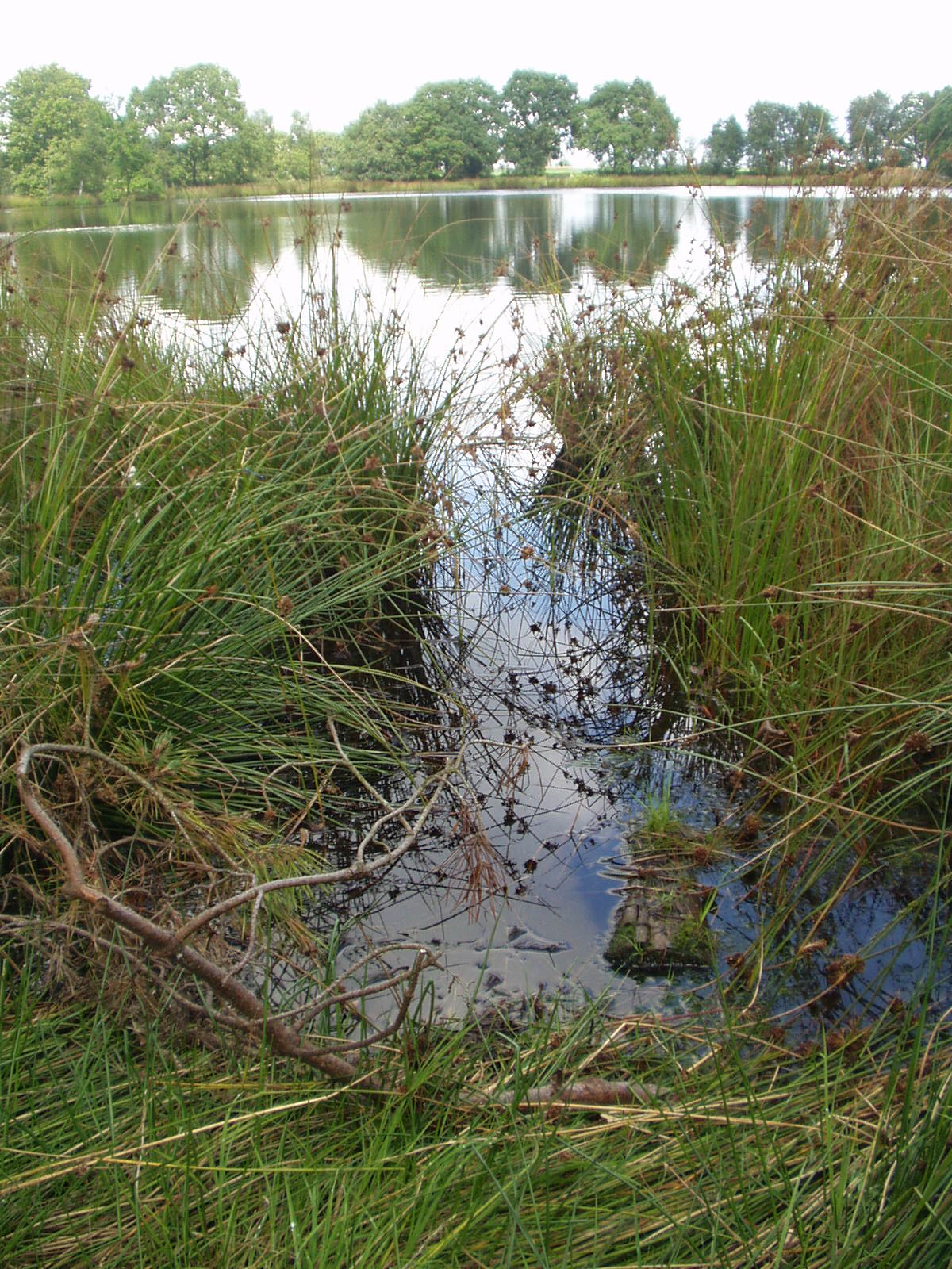 categorie:afbeelding landschap